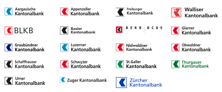 f